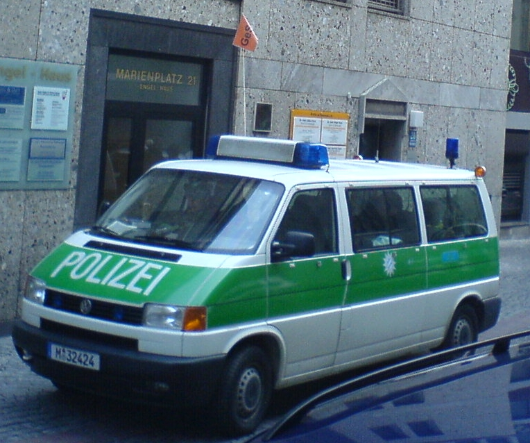 Gefangenensammelstelle während der Münchner Konferenz für Sicherheitspolitik (Bayerische Polizei — Volkswagen T4), mit Fahne "GeSa" gekennzeichnet